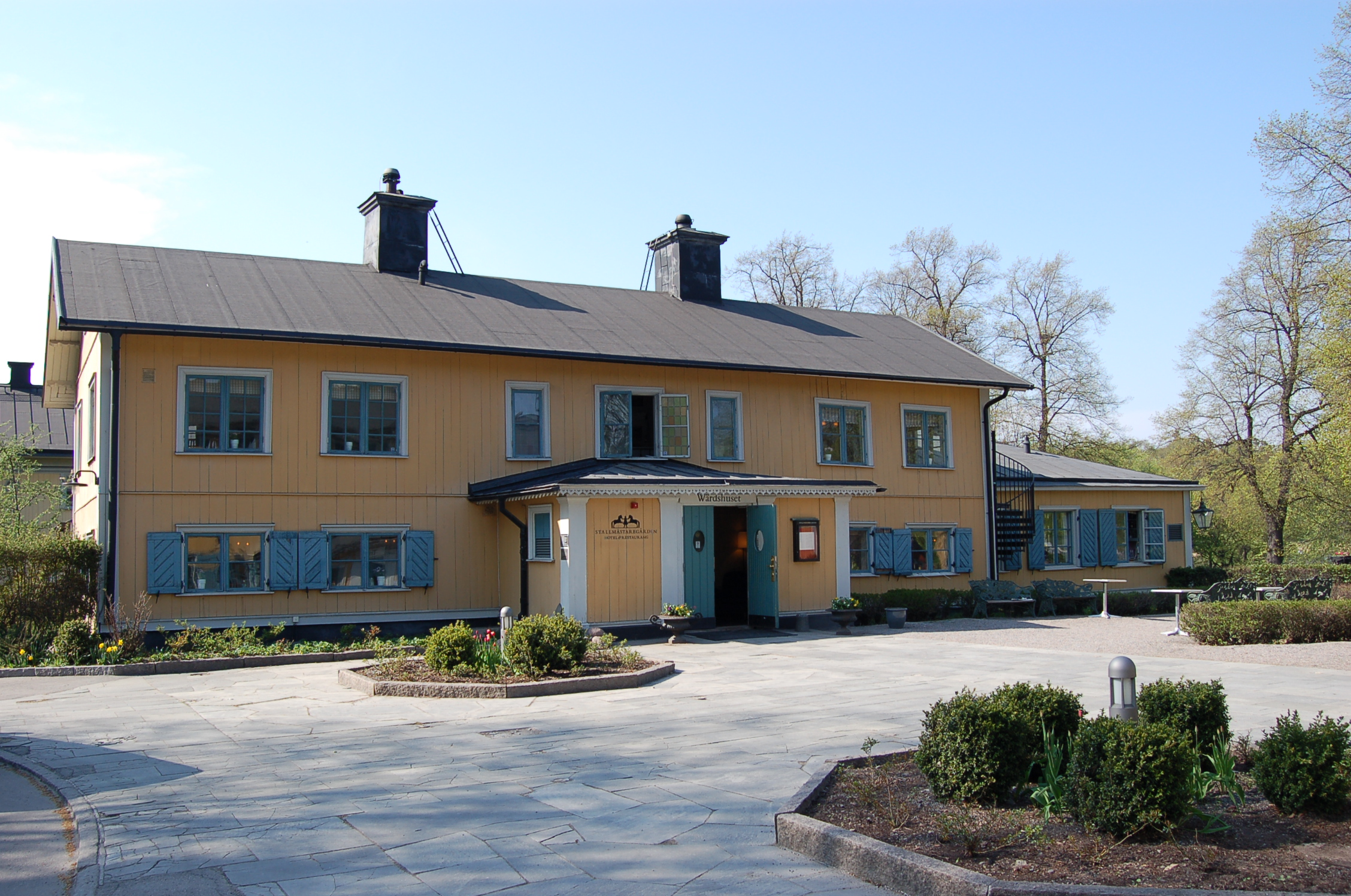 Värdshuset Stallmästaregården i Solna